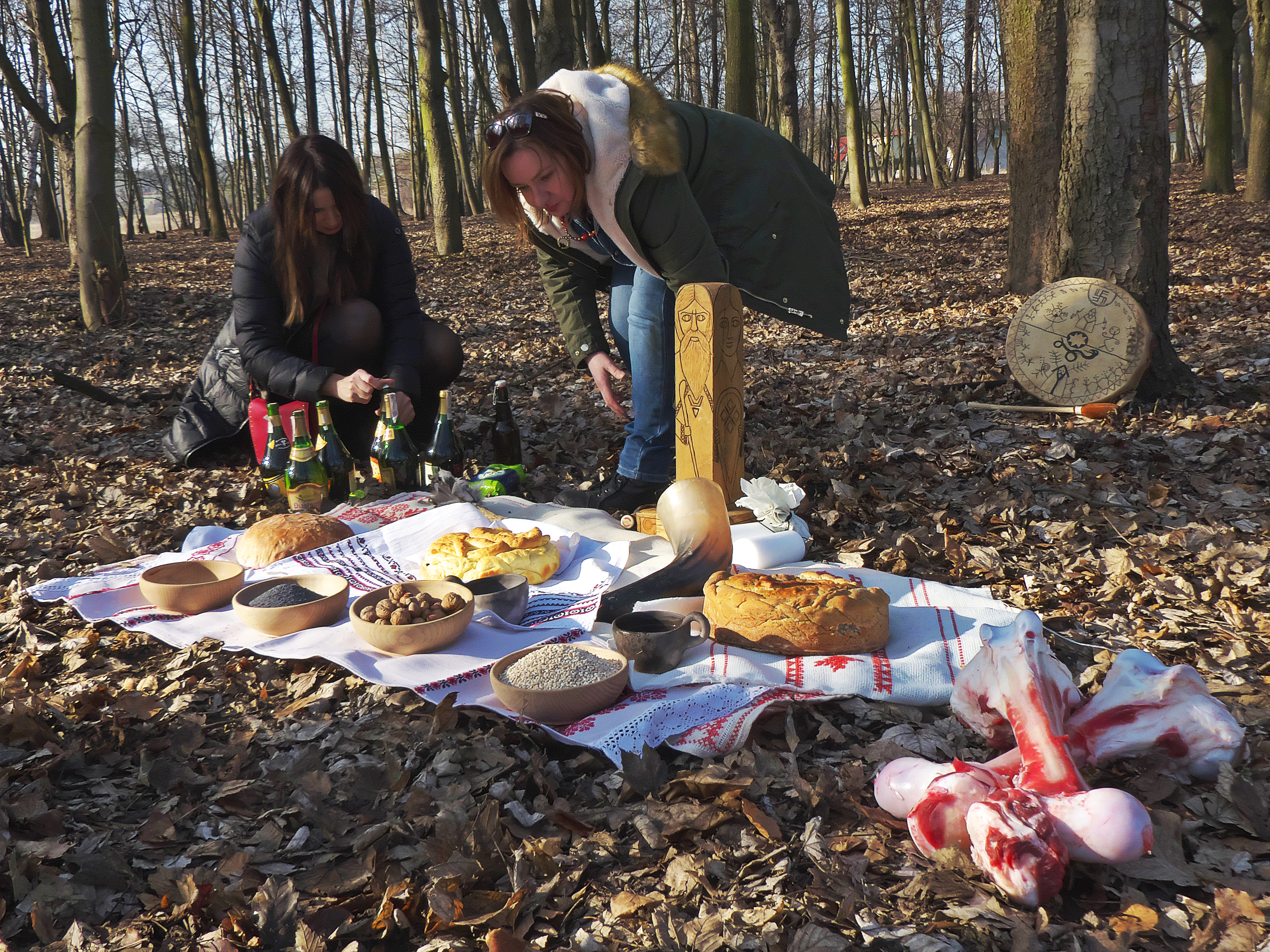 Przygotowanie ołtarza i ofiar przed obrzędem w trakcie Święta Welesa, zorganizowanego przez Gromadę MIR w Będzinie w Zagłębiu Dąbrowskim w dniu 16 lutego 2019.